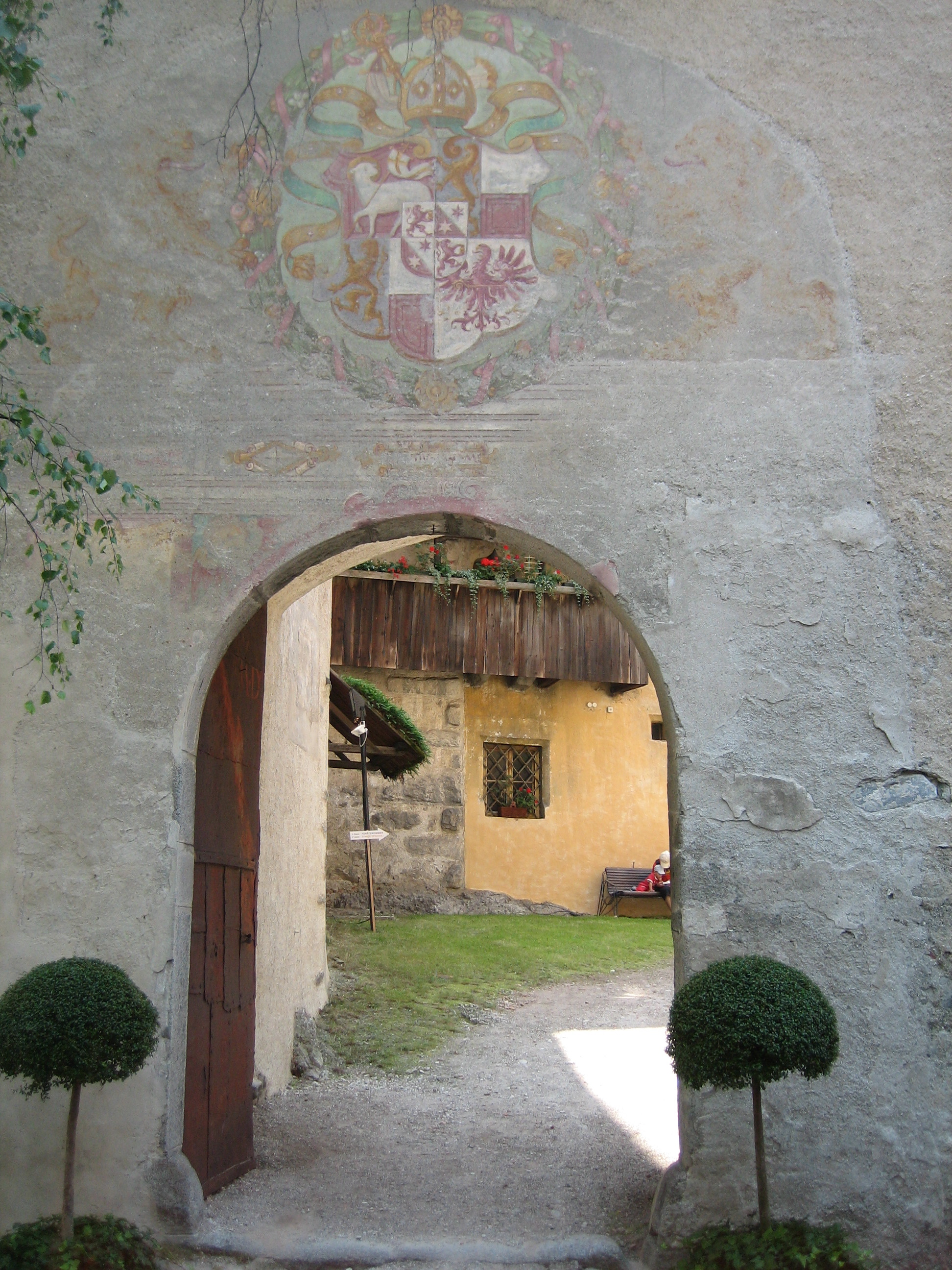 Schloss Bruneck: Hoftor mit dem Wappen des Brixener Fürstbischofs Christoph Andreas von Spaur